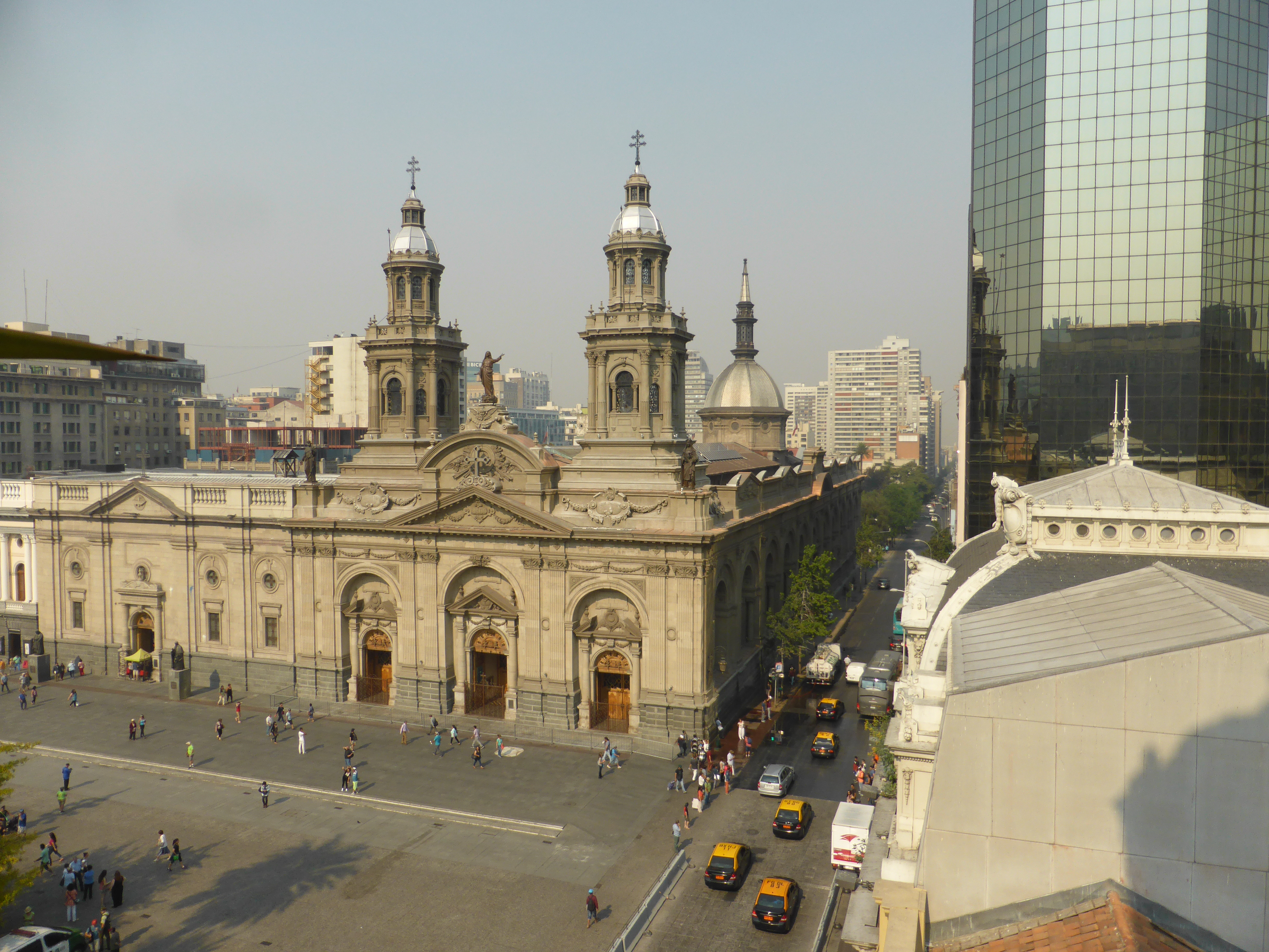 La catedral y una esquina de la Plaza de Armas, vista desde un balcón de la torre del Museo Histórico Nacional. A la torre de dicho museo se asciende mediante tramos de escaleras de caracol.